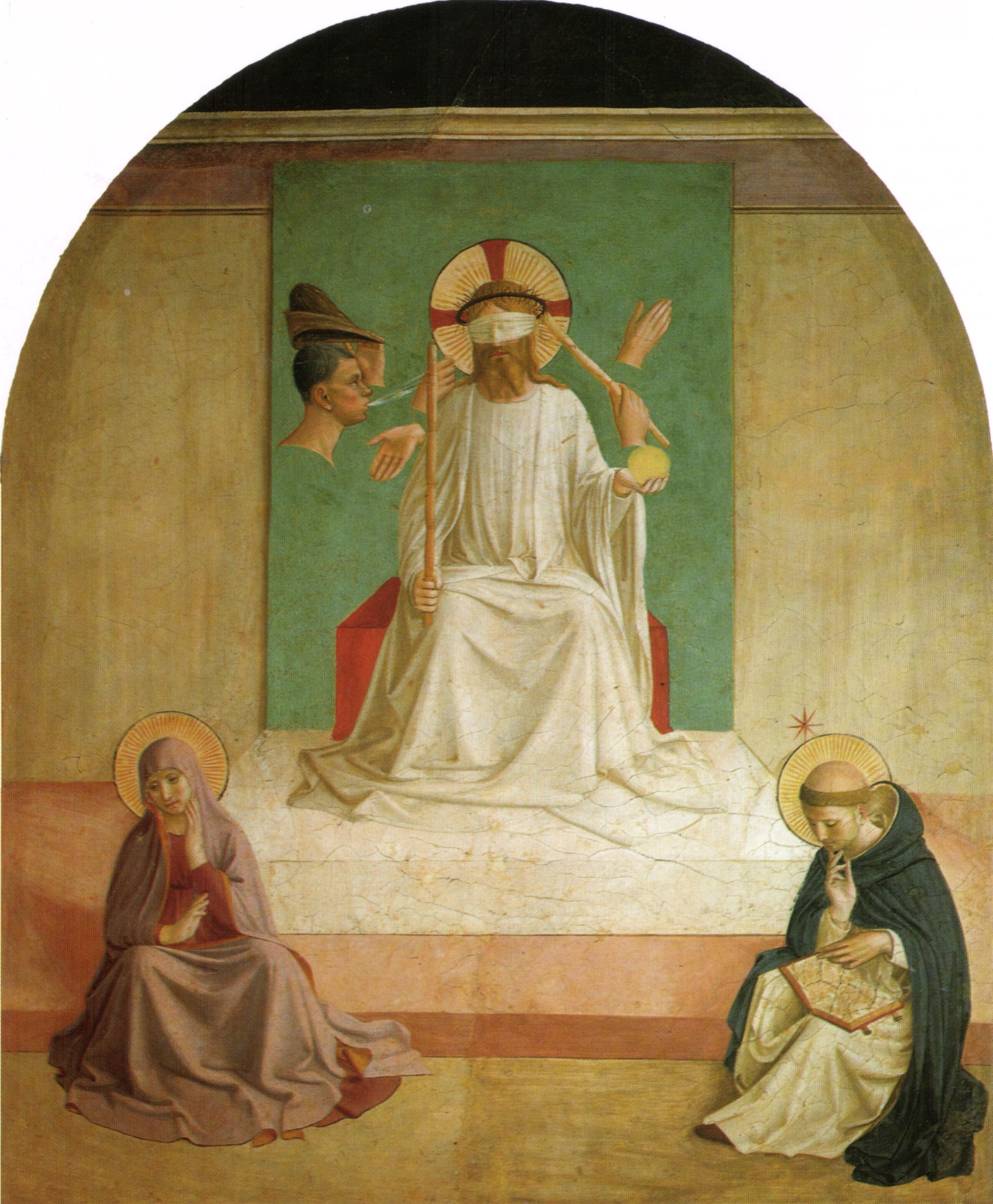 fresco restored